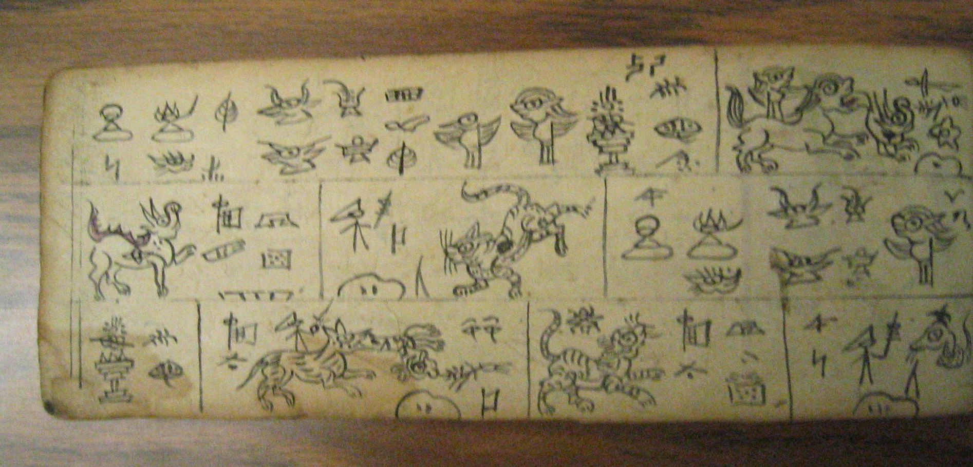 Naxi manuscript